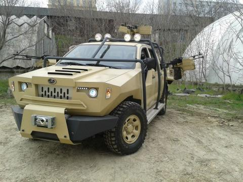 Gürzə patrul maşını